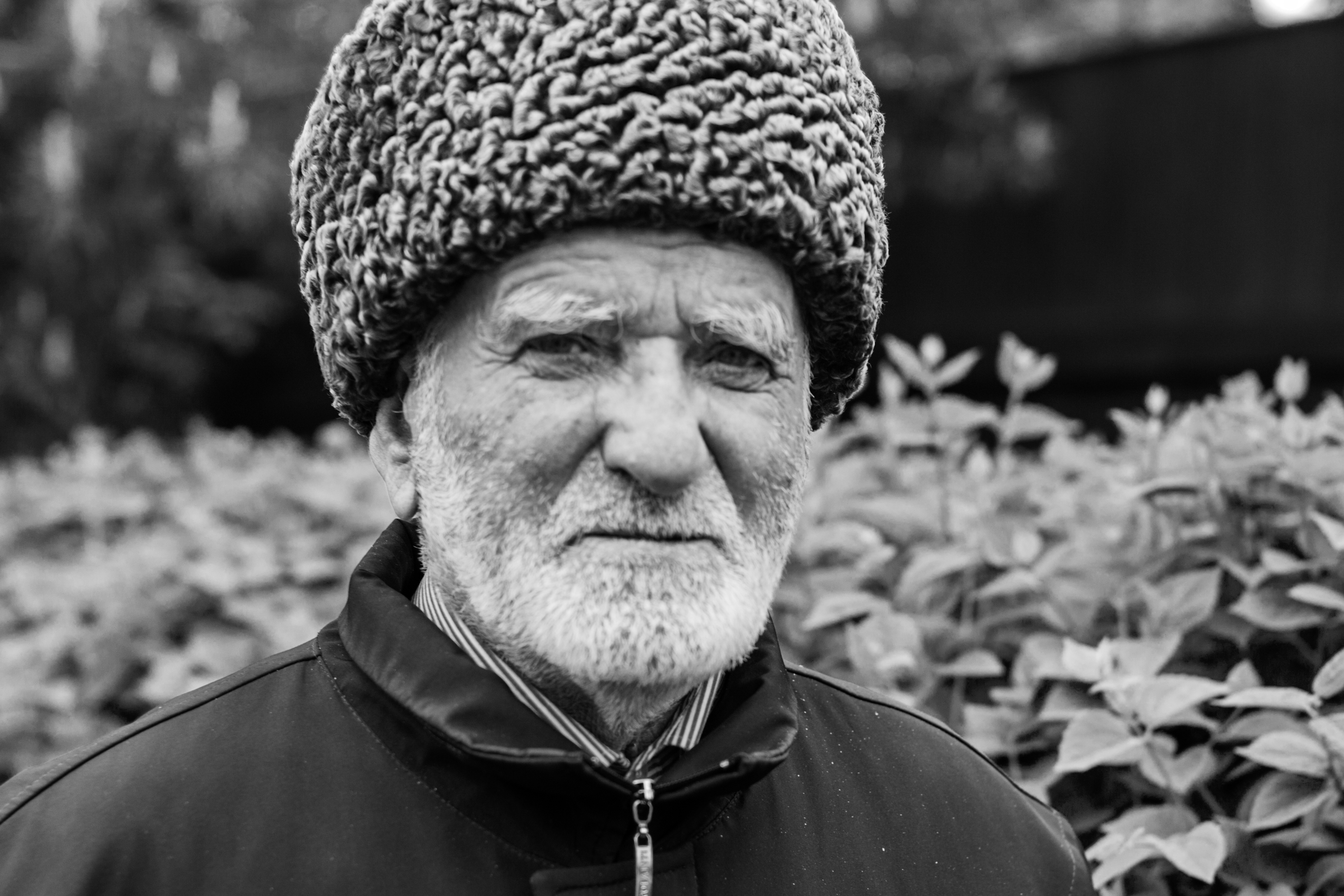 Один из духовных лидеров Северного Кавказа. Один из первых кто совершил Хадж во времена Советского Союза. Балкарец. Год рождения 1928.